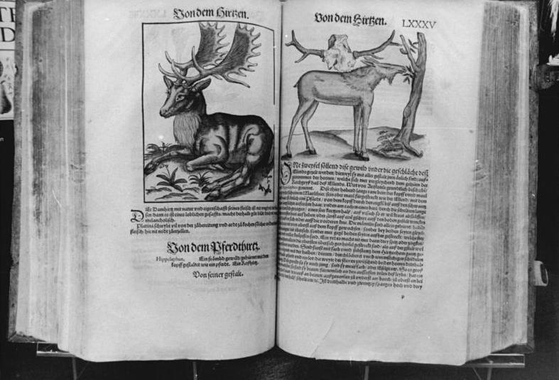 Konrad Gesner, Vogel-, Fisch- und Tierbuch ADN-ZB Grubitzsch 22.11.85 Leipzig: Deutsche Bücherei-40. Jahrestag der Wiedereröffnung (24.11.85)- Unter den wertvollen Beständen des Deutschen Buch- und Schriftmuseums in der Deutschen Bücherei befindet sich das Vogel-, Fisch- und Tierbuch von Konrad Gesner. Es wurde 1557 und 1563 in Zürich von Christoph Froschauer gedruckt. Das Museum in der Bücherei beherbergt Sachzeugen zur Geschichte des Buches, der Schrift, des Papiers und des Einbandes, die bist zu den frühen Schriftkulturen der Babylonier und Ägypter zurückgehen und bis zur Gegenwart fortgesetzt werden. (siehe 13,14,15 N und ADN-Meldung)